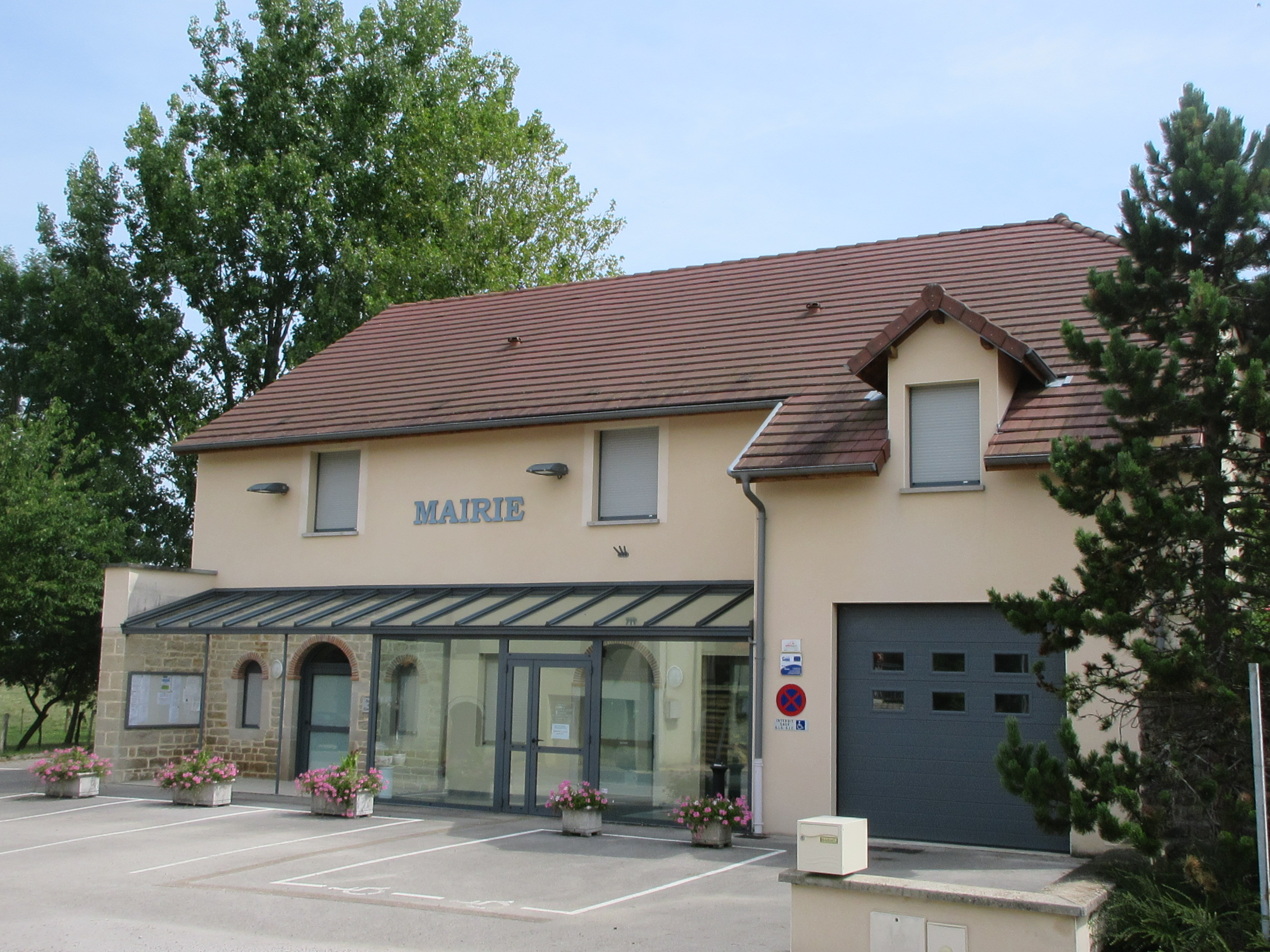 Mairie de Trenal.